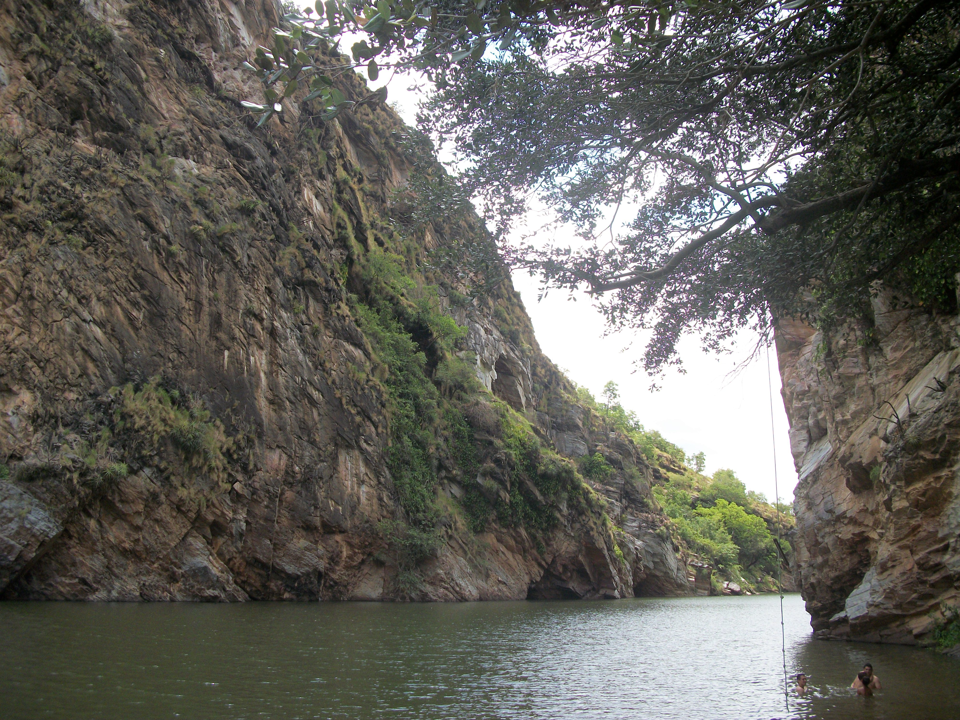 Boqueirão do Rio Salgado, atração turística em Lavras da Mangabeira, Ceará